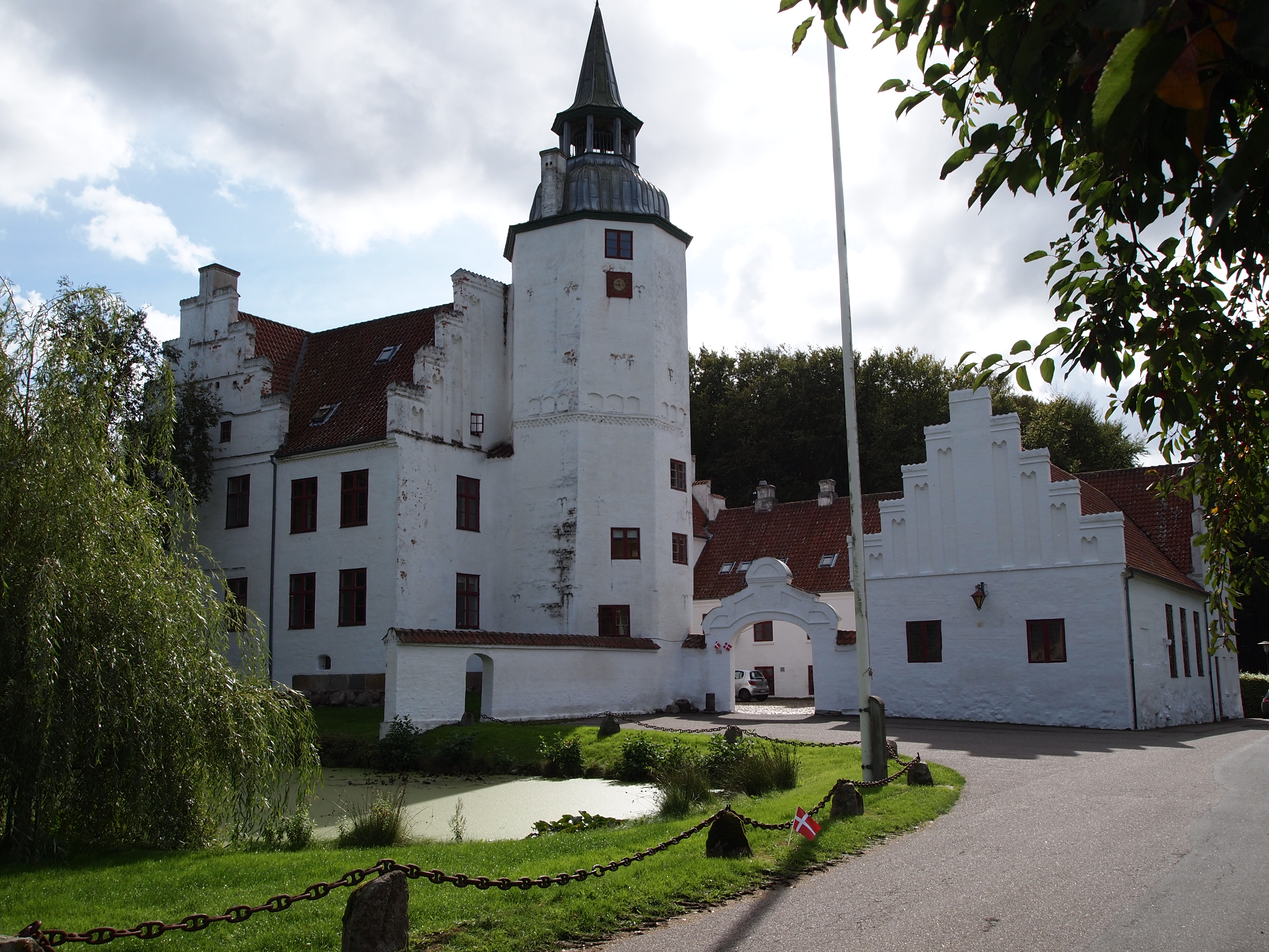 Rydhave